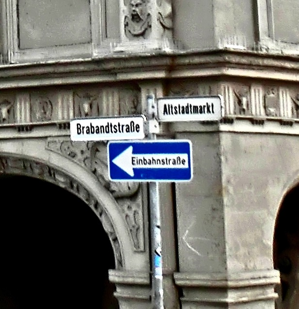 Braunschweig, Straßenschilder Brabandtstraße und Altstadtmarkt am Gewandhaus